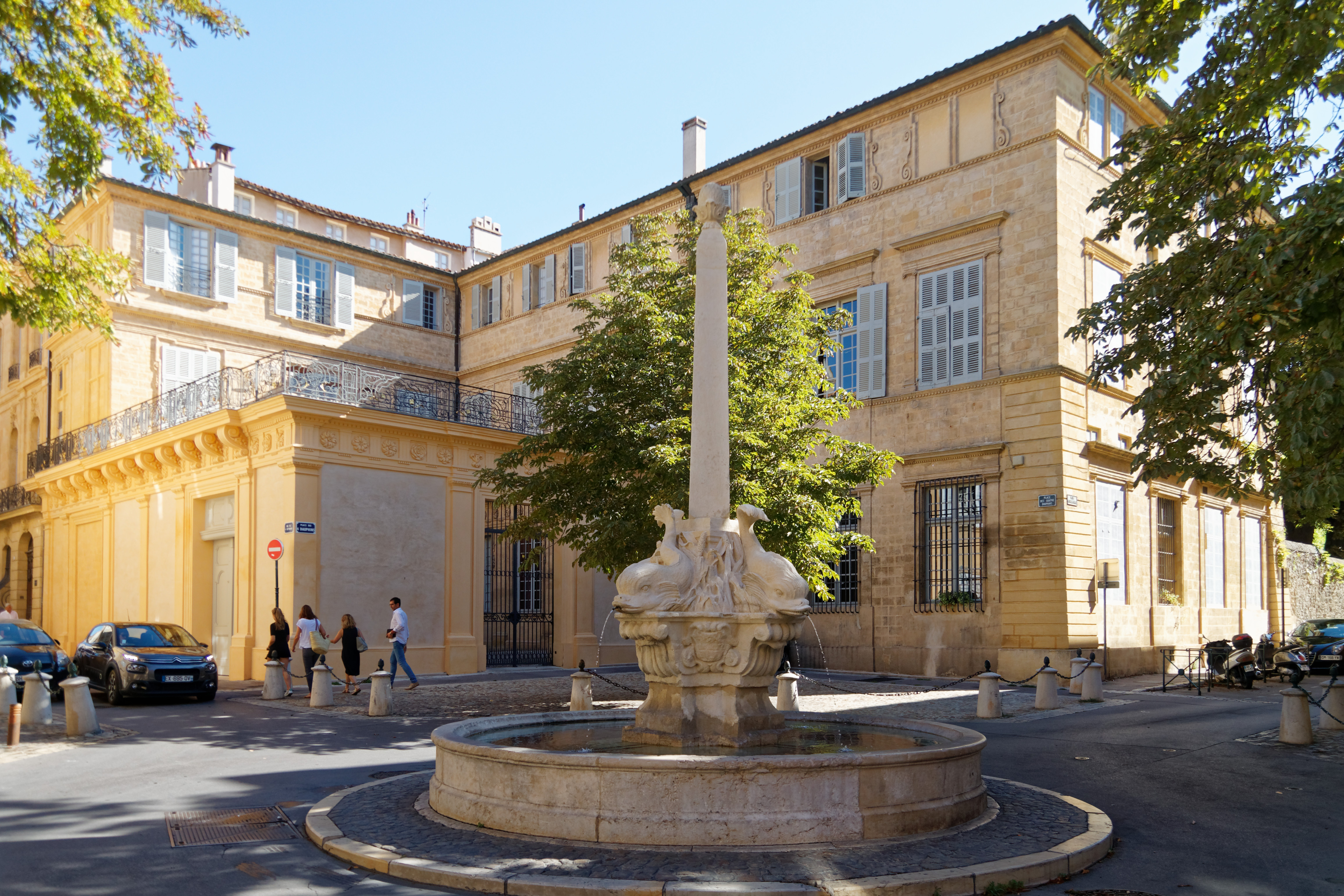 Fontaine des Quatre-Dauphins in Aix-en-Provence